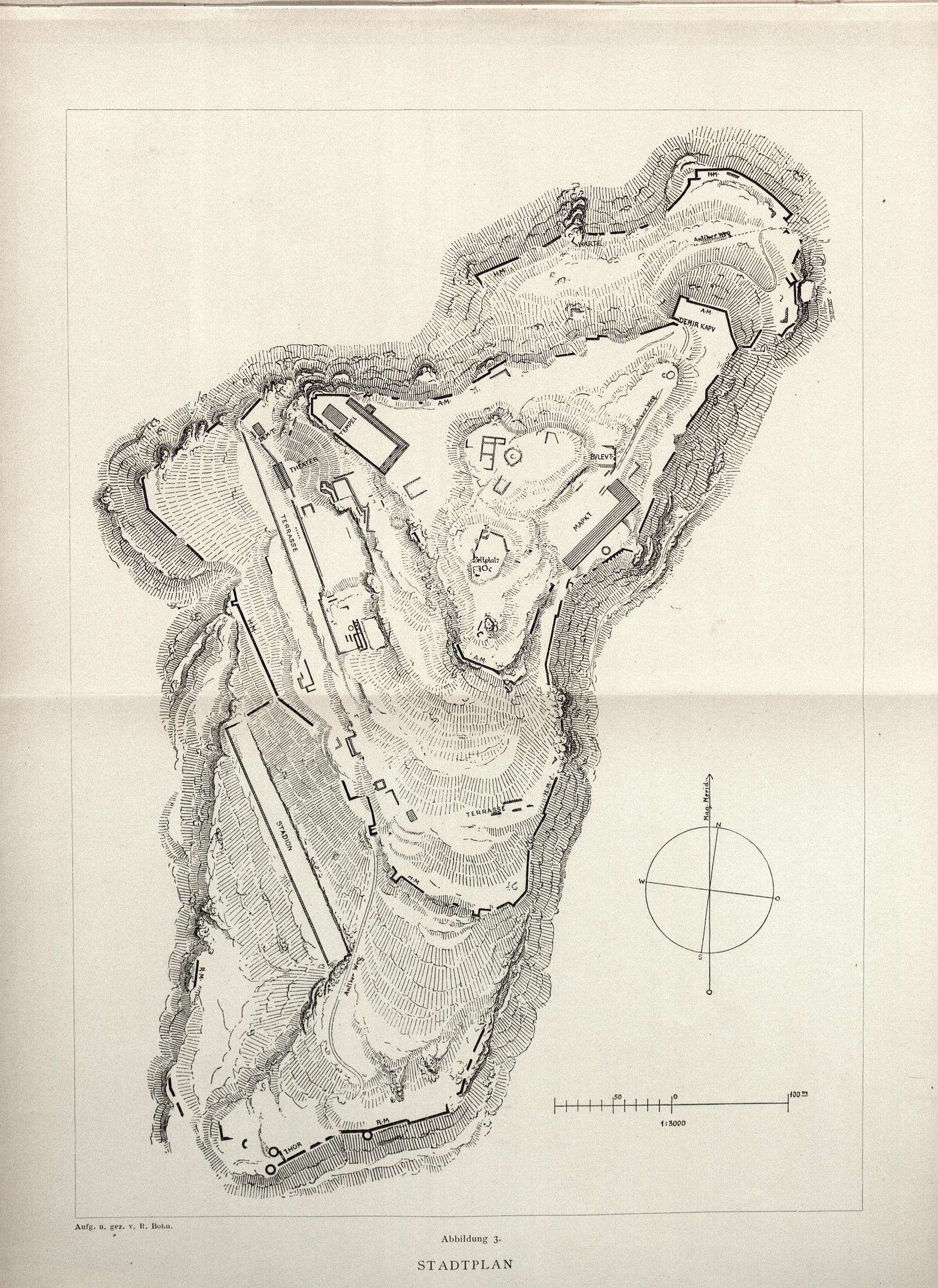 Stadtplan von Aigai (Äolis), gezeichnet 1889 von Richard Bohn, aus "Altertümer von Aegae"